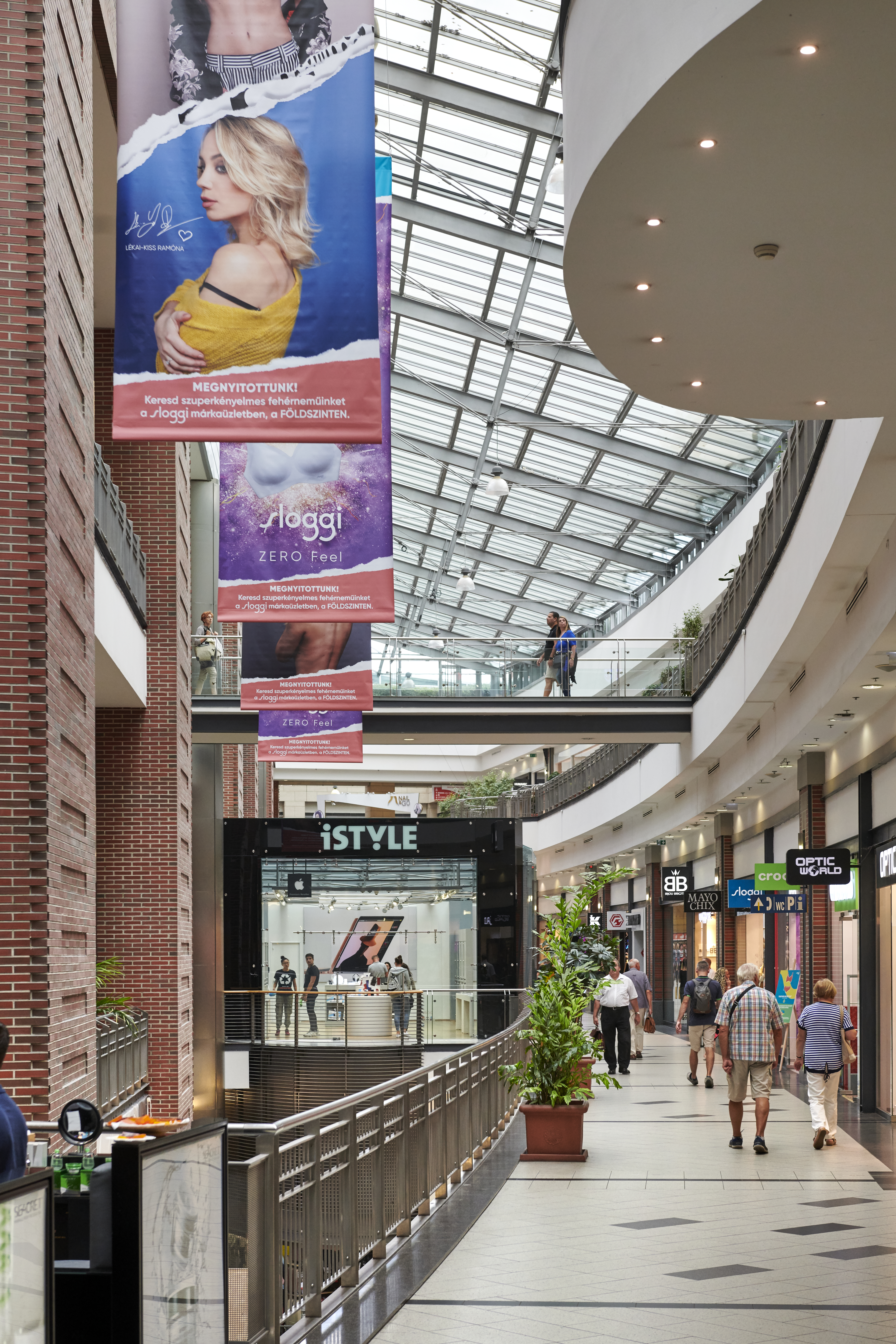 A megújult Westend belső részlete